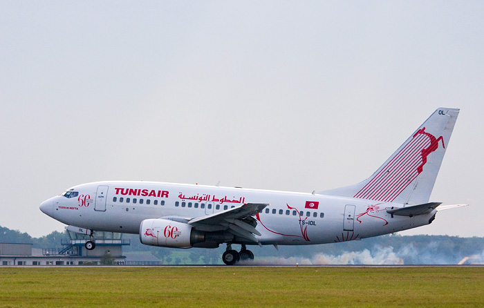 Landung am Flughafen Wien-Schwechat